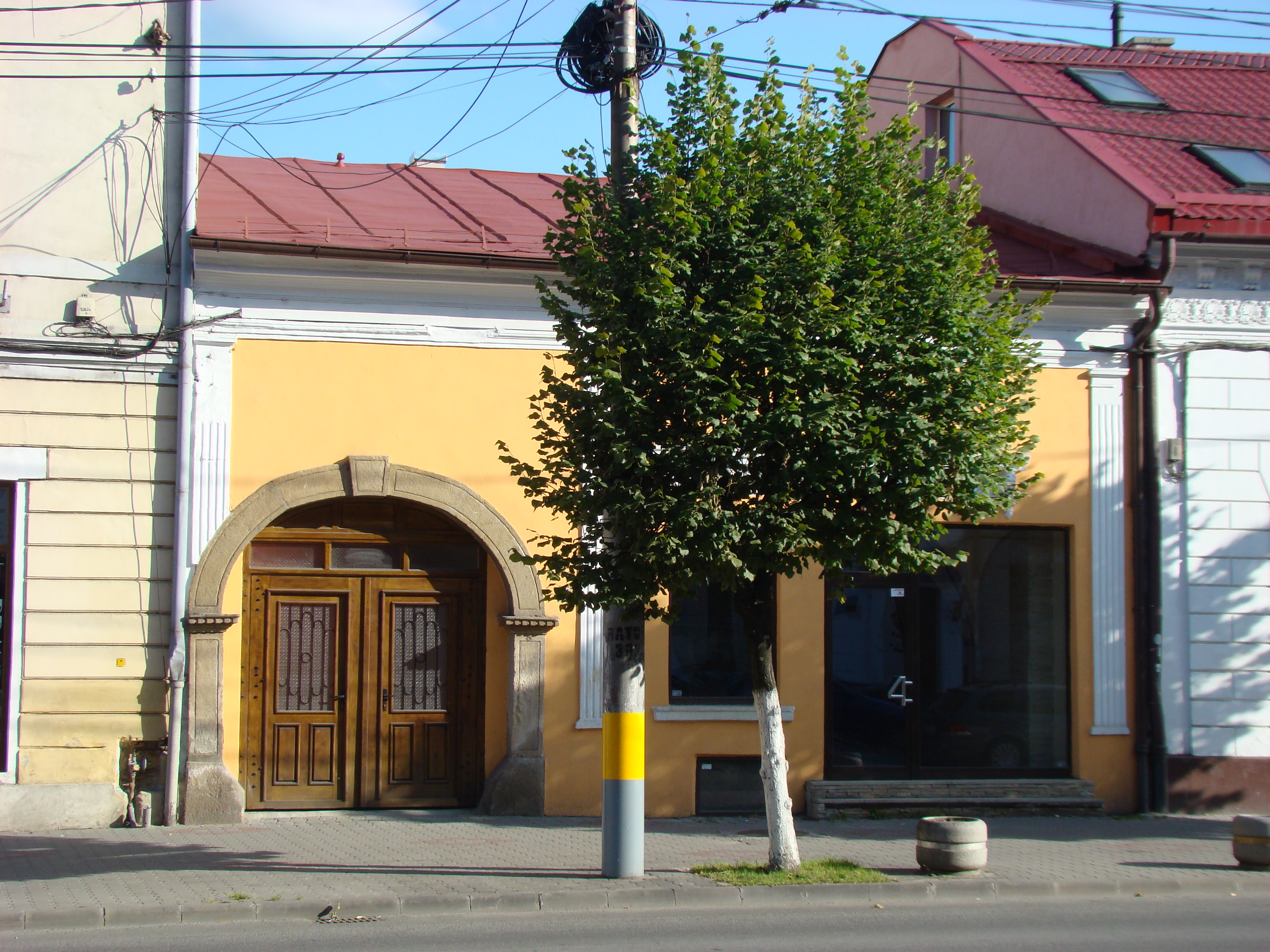 Casă, monument istoric, Bd.21 Decembrie 1989, nr.44